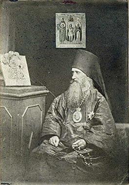 Епископ Павел (Доброхотов). 1892 г